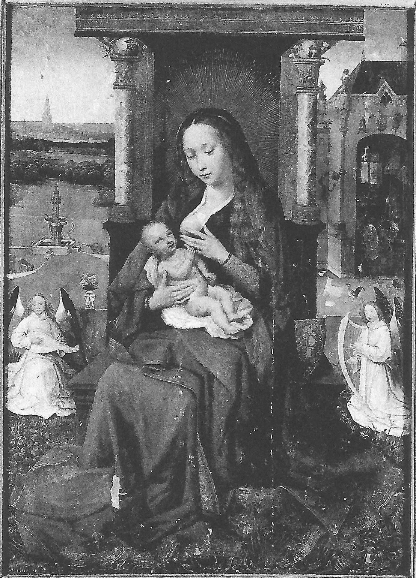 Vierge à l'Enfant, huile/bois, 100,5 x 71 cm, Gand, collection particulière.